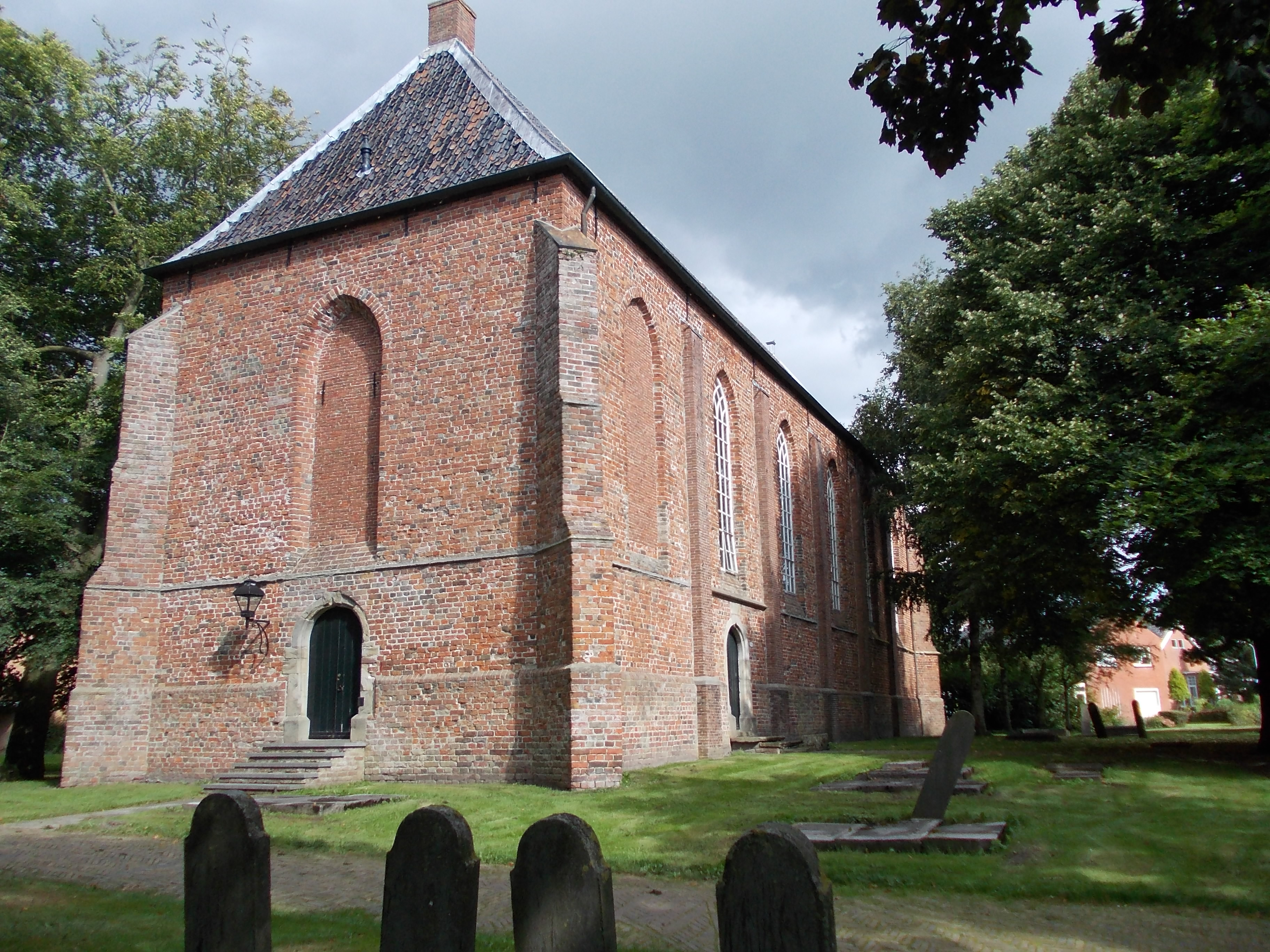 Bartholomeuskerk Beerta